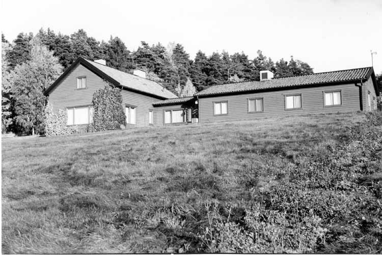 Baset, anläggningen vid Mälaren från sjösidan, Järfälla kommun, tillhörde Görvälns gård. Det var Karl Salins sommarbostad, uppfördes omkring 1937-1938. Järfälla kommuns bilddatabas. Bild nr 00122.